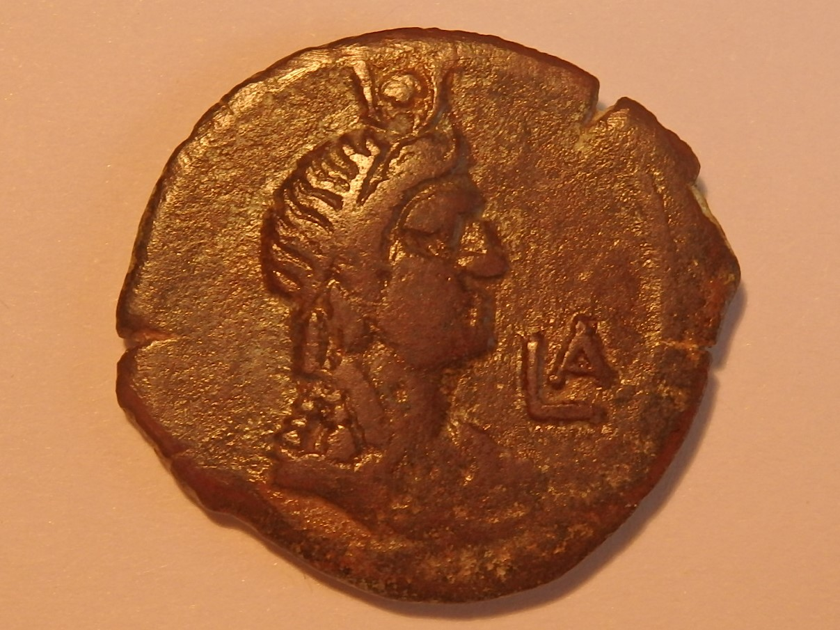 Isis auf Münze aus Alexandria, z.Zt. Kaiser Vespasianus', Kampmann/Ganschow 20.8